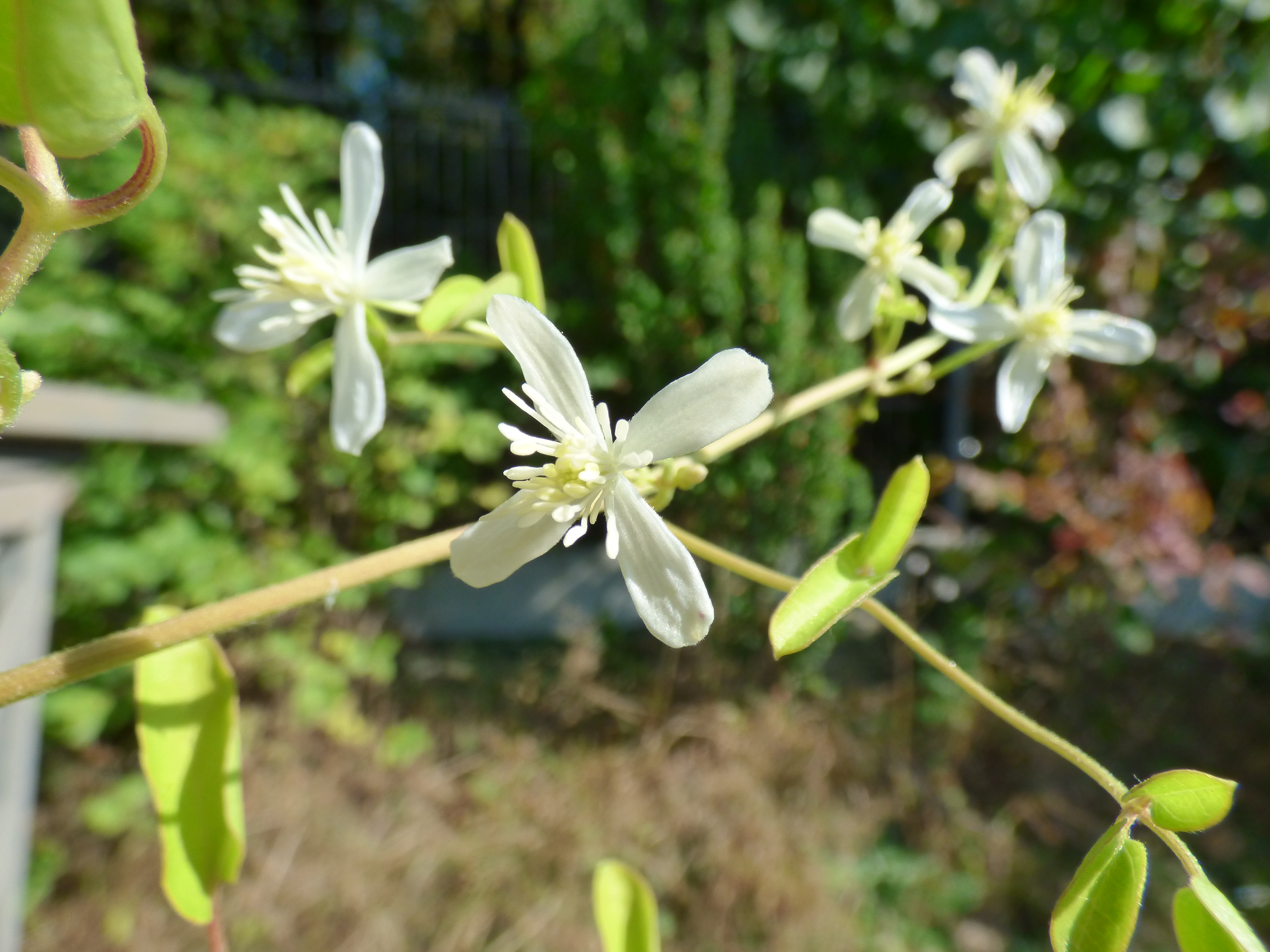 Powojnik jesienny.Powojnik japoński.Clematis terniflora 'Early Snow' Pochodzi z krajów Azji północno-wschodniej (Chiny, Japonia, Korea, Mongolia, Rosja (Syberia), Tajwan). Kwiaty w kształcie gwiazdy pojawiają się od końca sierpnia do października.